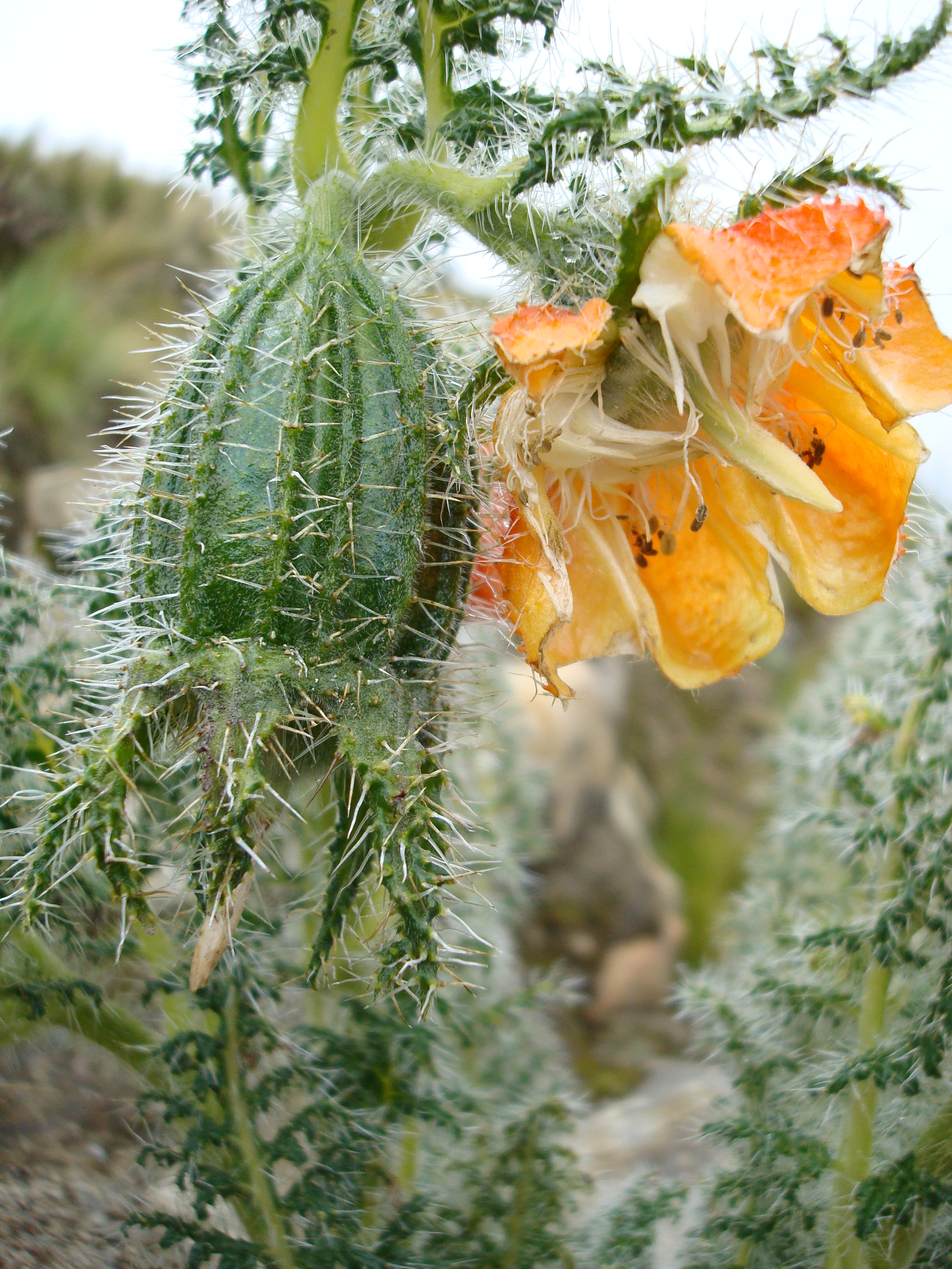 Flor y fruto de caiophora , La Paz Bolivia